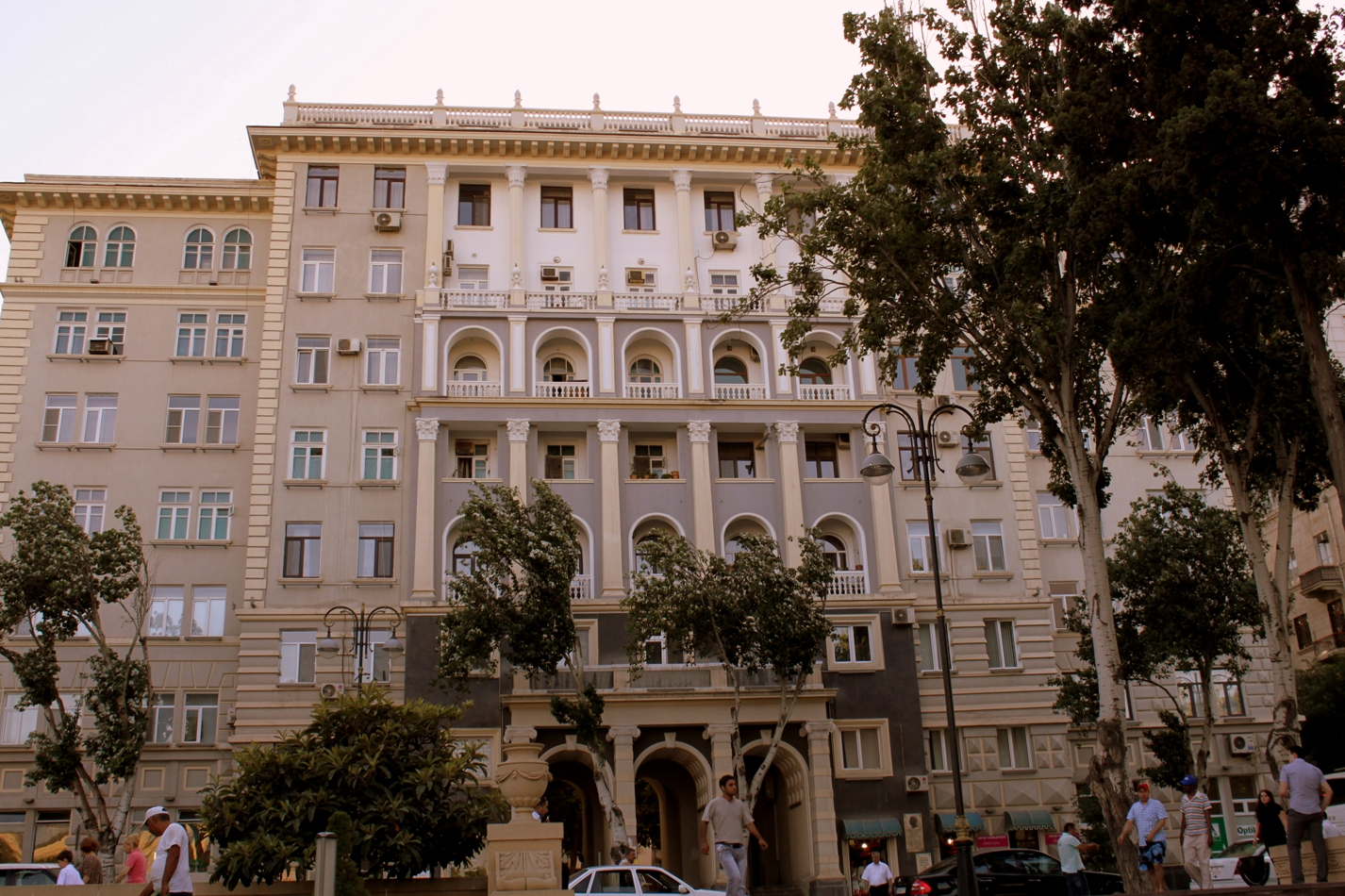 Здание Монолит на улице Истиглалият в Баку.